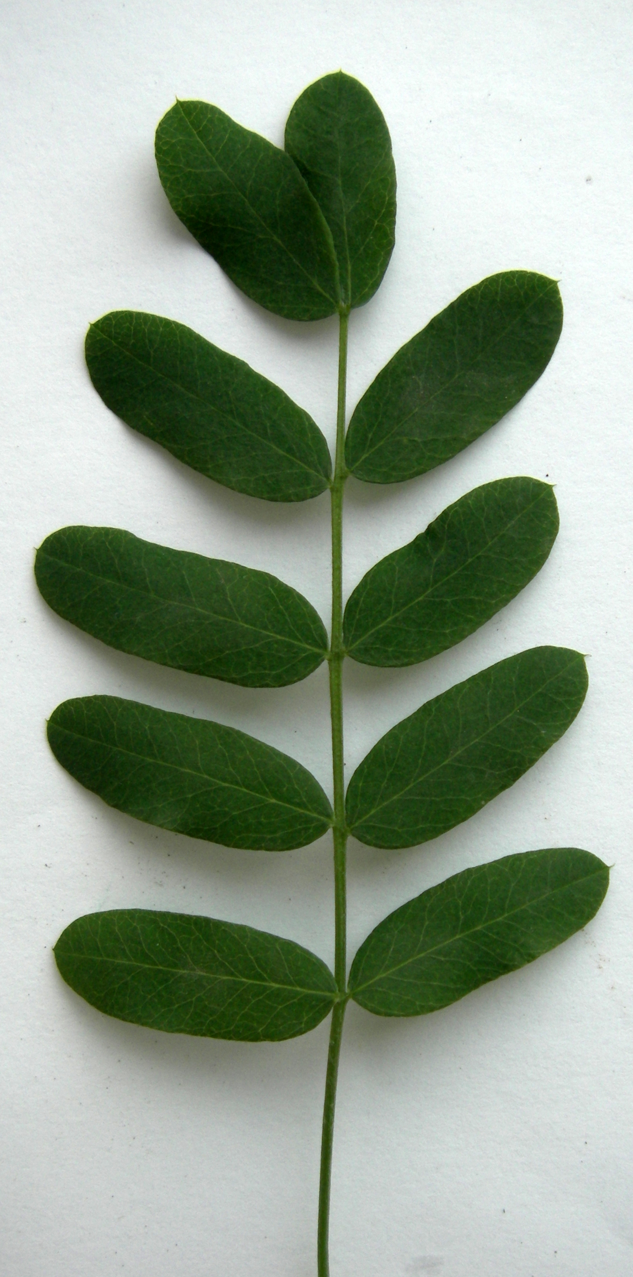 Ветвь акации